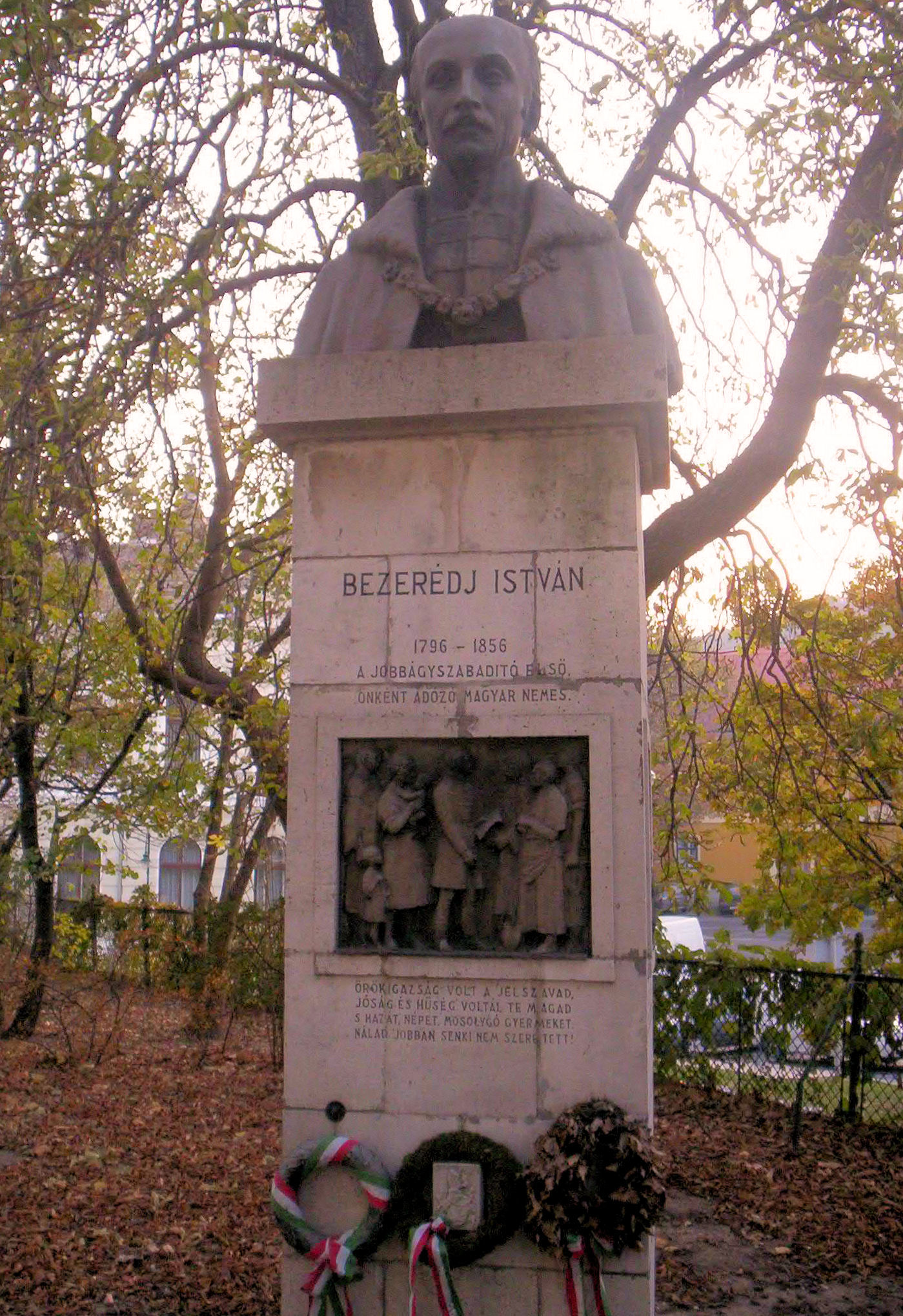 Bezerédj István szobra Szekszárdon. Konrád Sándor alkotása (1942) – photo taken by uploader User:Csanády in 2006.